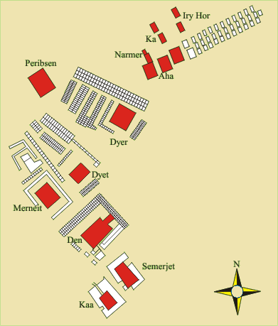 Umm el-Qaab tombs